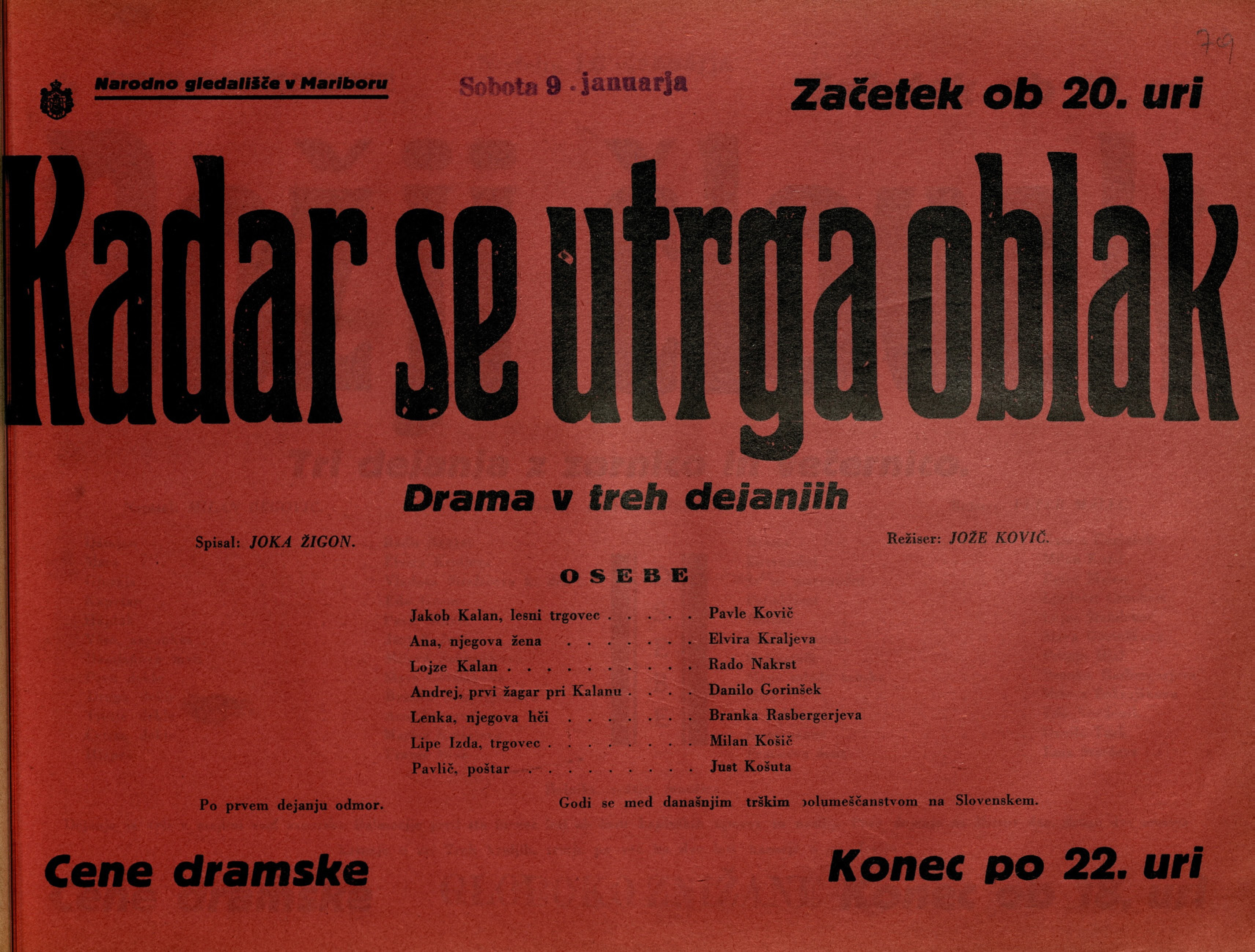 Plakat za predstavo Kadar se utrga oblak v Narodnem gledališču v Mariboru.